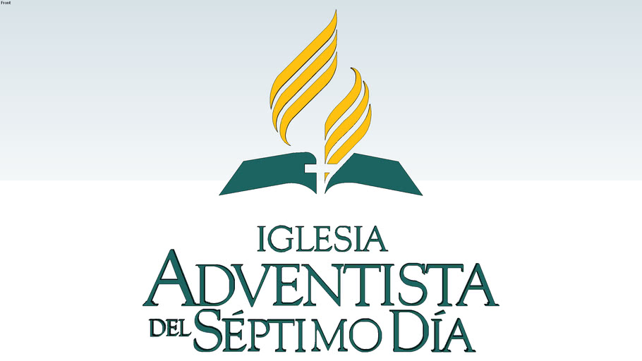 Logotipo religioso